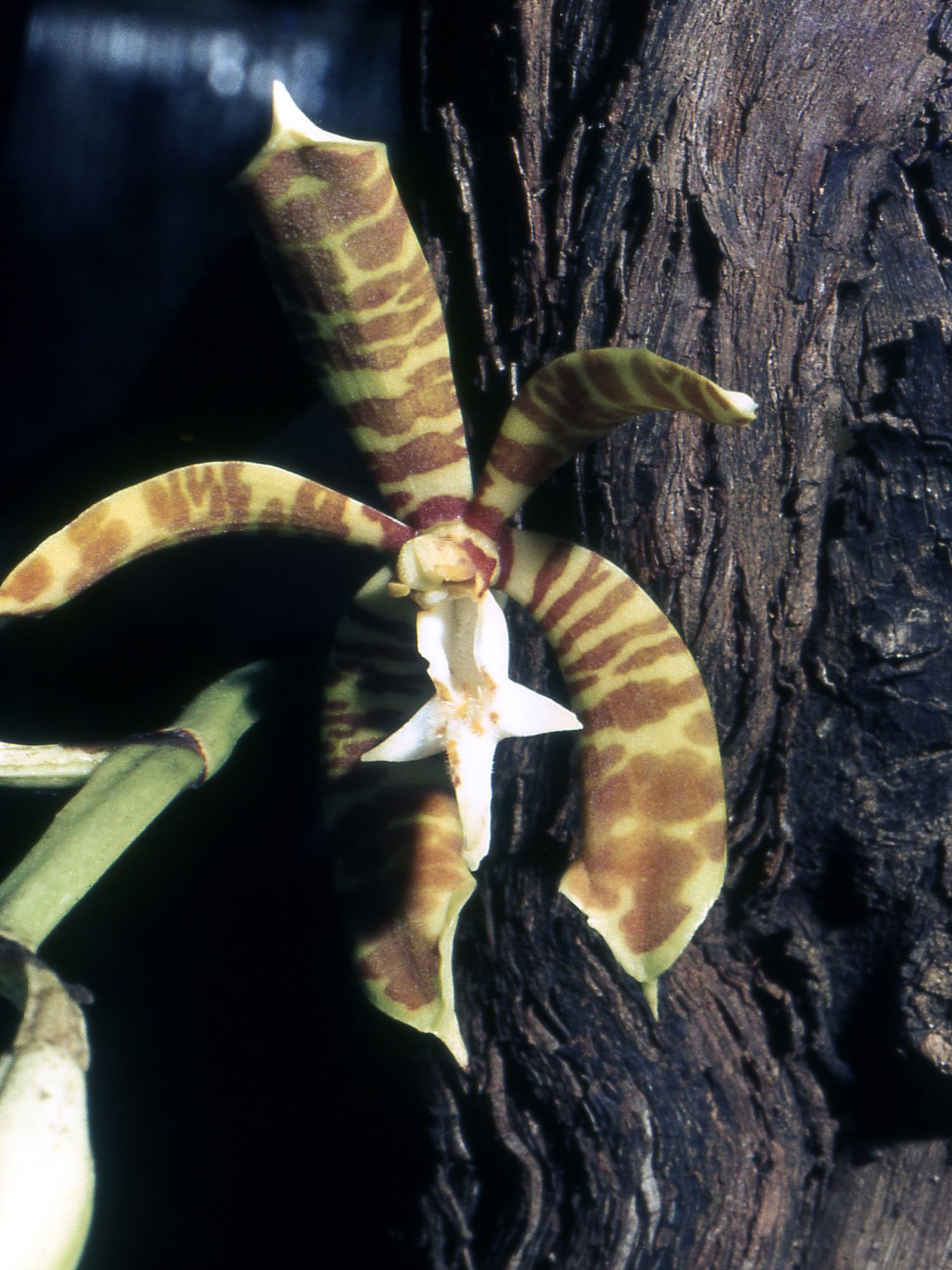 Trichoglottis fasciata